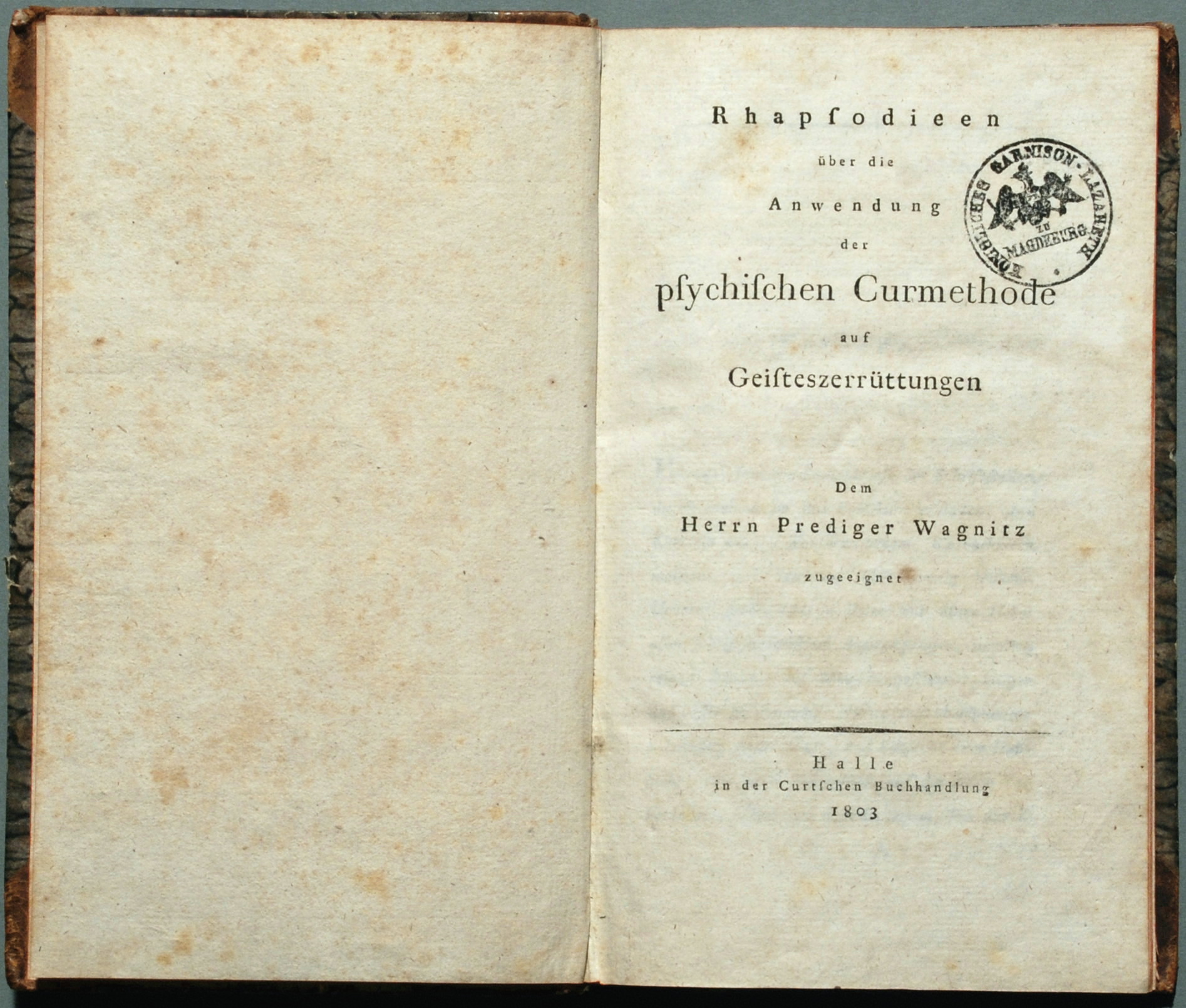 Reil, Johannes Christian: Rhapsodieen über die Anwendung der psychischen Curmethode auf Geisteszerrüttungen. Halle: Curt [1803], Erstdruck. Johann Christian Reil (1759 - 1813) war Professor der Medizin und Stadtphysikus in Halle/Saale. Verfasste zahlreiche Arbeiten auf dem Gebiet der allgemeinen Medizin. Gilt zusammen mit F. J. Gall als Begründer der naturwissenschaftlichen Psychiatrie (Lehre vom Gehirn als dem Organ der Seele; Janzarik 1974). Prägte 1808 den Begriff Psychiatrie und trat für sie ein als selbständige Disziplin neben Chirurgie und Medizin. Wandte sich gegen Missstände in der Unterbringung Geisteskranker, setzte sich für Beschäftigung der Patienten ein und für psychotherapeutische Maßnahmen. Gab zusammen mit dem Naturphilosophen Kayssler das kurzlebige „Magazin für die psychische Heilkunde“ (1805 - 1806) und mit J. C. Hoffbauer die „Beyträge zur Beförderung einer Kurmethode auf psychischem Wege“ (1808 – 1812) heraus.